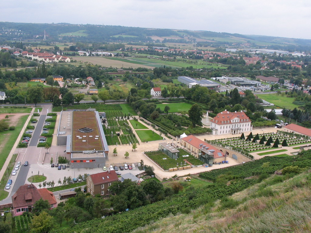 Blick vom Jacobstein: Schloss Wackerbarth mit Belvedere (re. mitte), Nebenanlagen und Park. Links unten Haus Fliegenwedel von der Rückseite